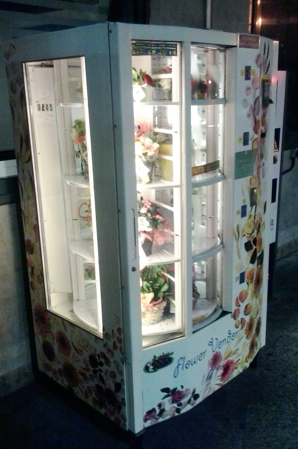 Máquina expendedora de flores